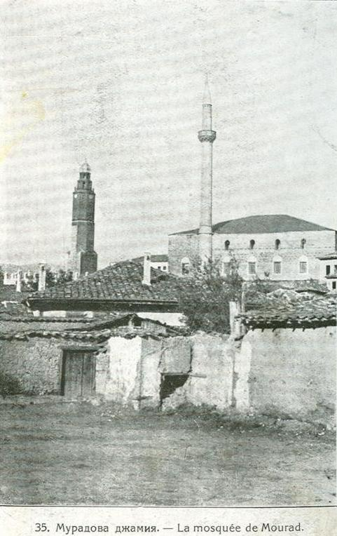 Източник: Алманах Македония в образи, София, 1919.